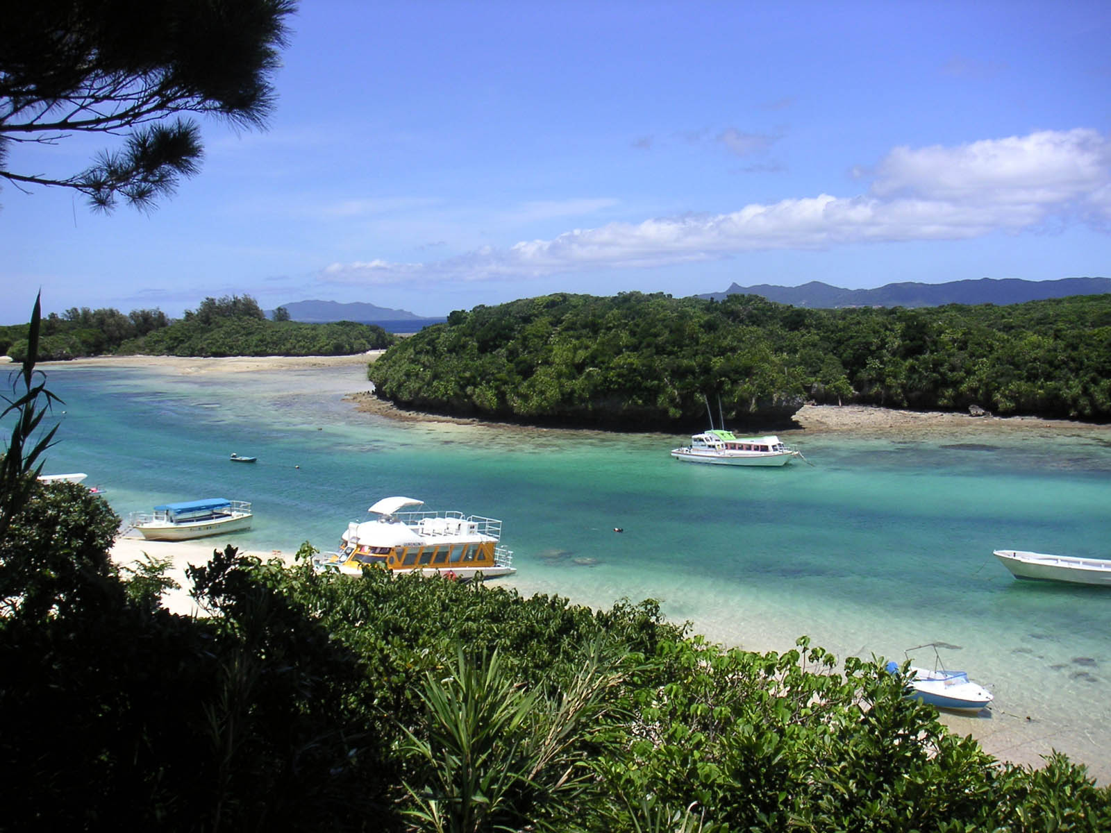 Kabira Gulf, Ishigaki Island, Okinawa, Japan / 沖縄県石垣島の川平湾